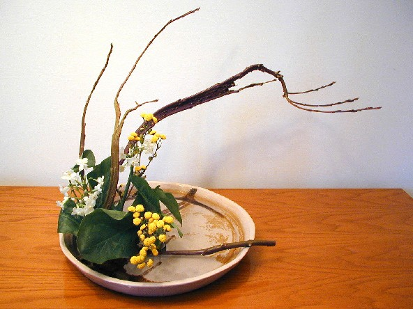 Ikebana6